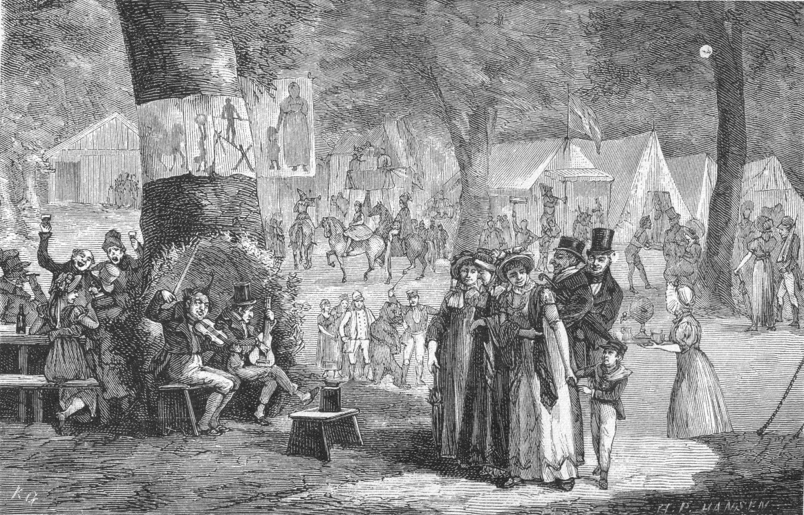 Københavnerliv på Dyrehavsbakken i 1800-tallet